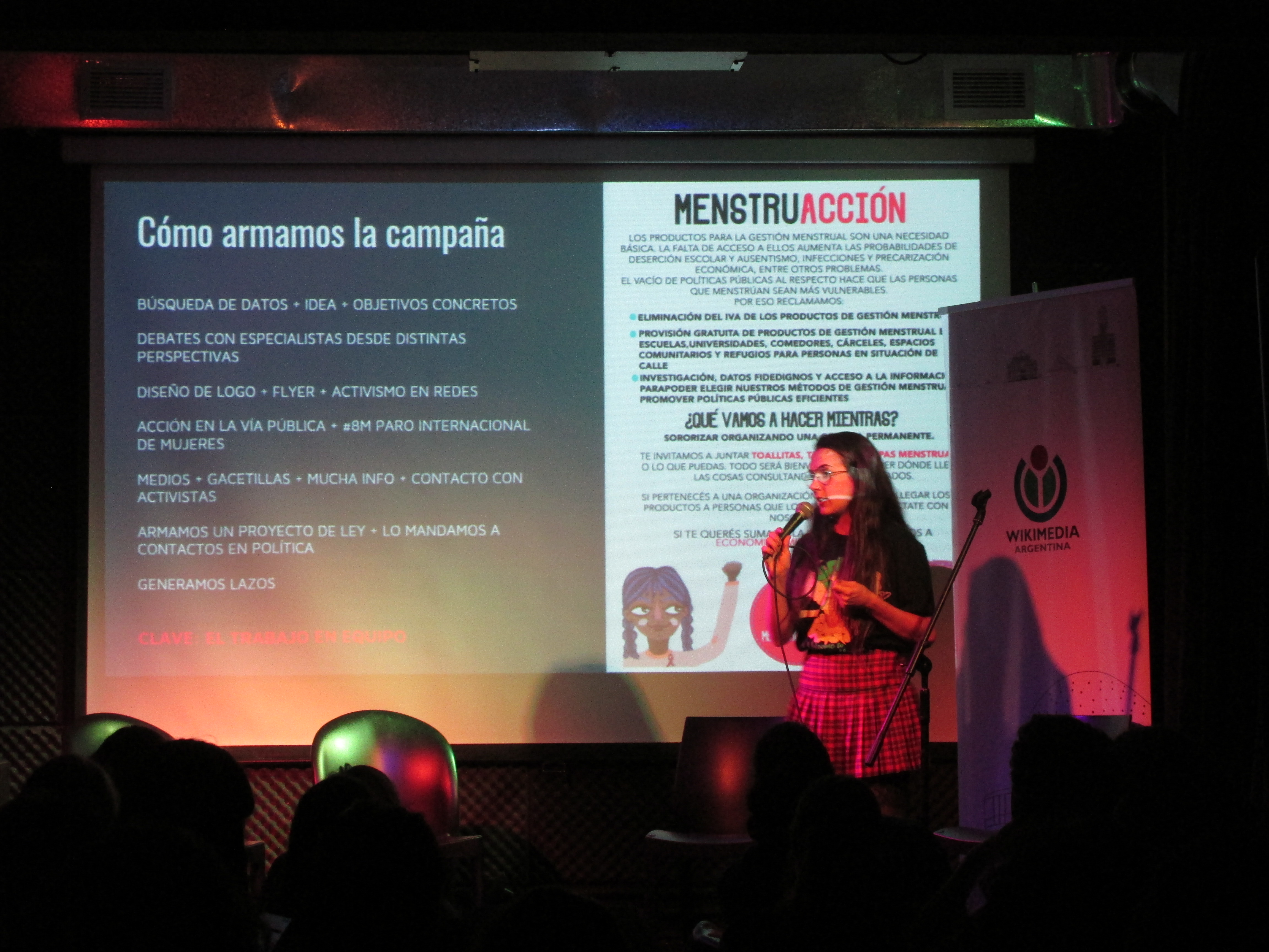 Primer encuentro de la iniciativa #BarraLibre. Tema: Género y divulgación científica. Oradores/as en orden de aparición: Jorge Abreu (WMAR), Victoria Cano Colazo (RAGCyT), Agostina Mileo -a.k.a. La Barbie Científica- (EconomíaFemini(s)ta), Valeria Edelsztein (CONICET, #ContemosHistorias).